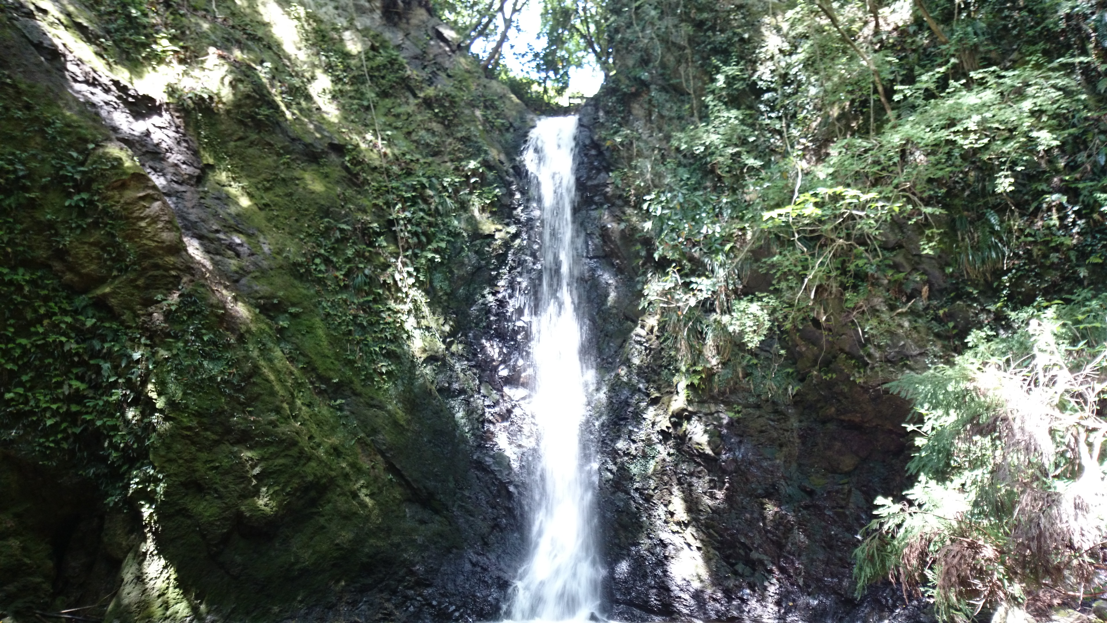 千葉県南房総市和田浜にある黒滝